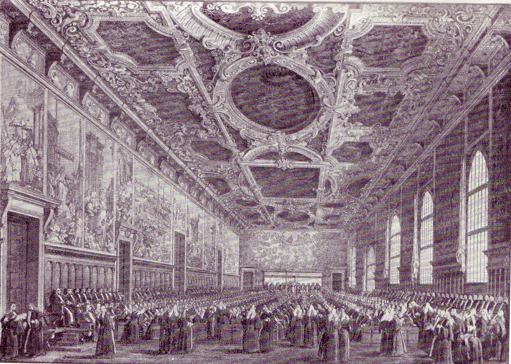 Seduta del Maggior Consiglio incisione